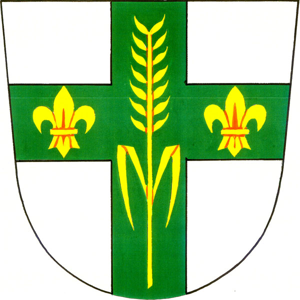 Znak obce Pamětice